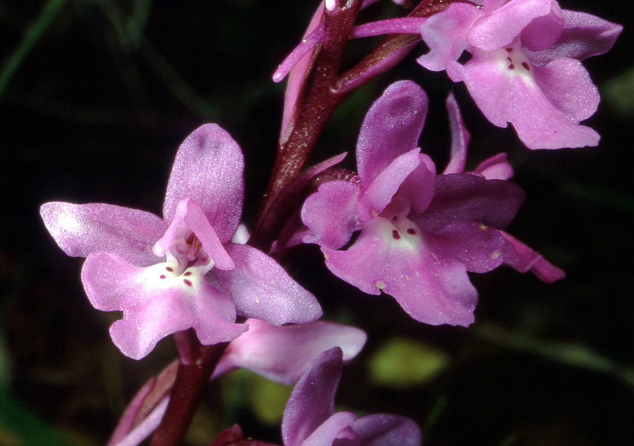 Orchis quadripunctata flowers